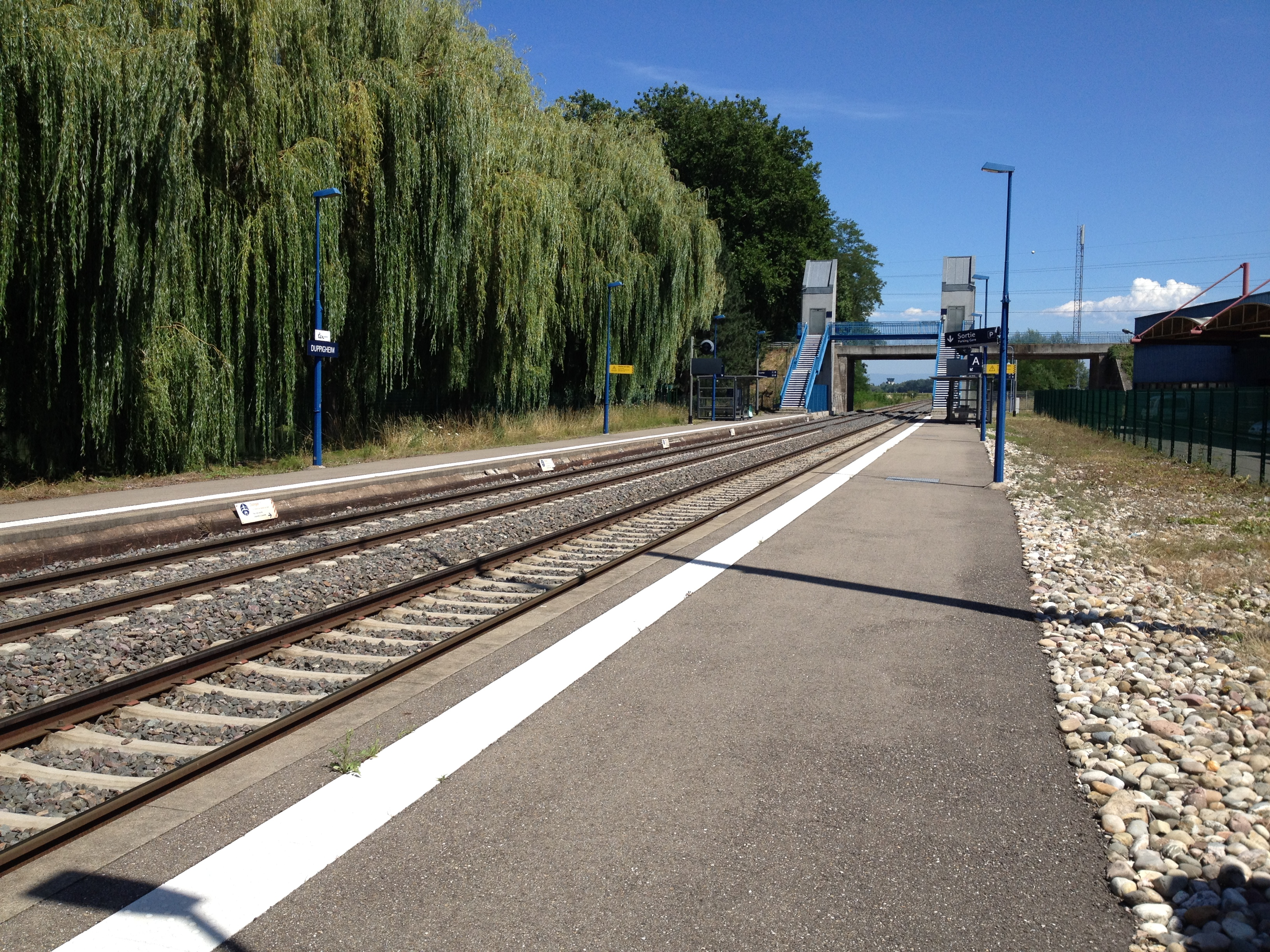 Gare de Duppigheim, Bas-Rhin, Alsace, France. Les quais et la passerelle.